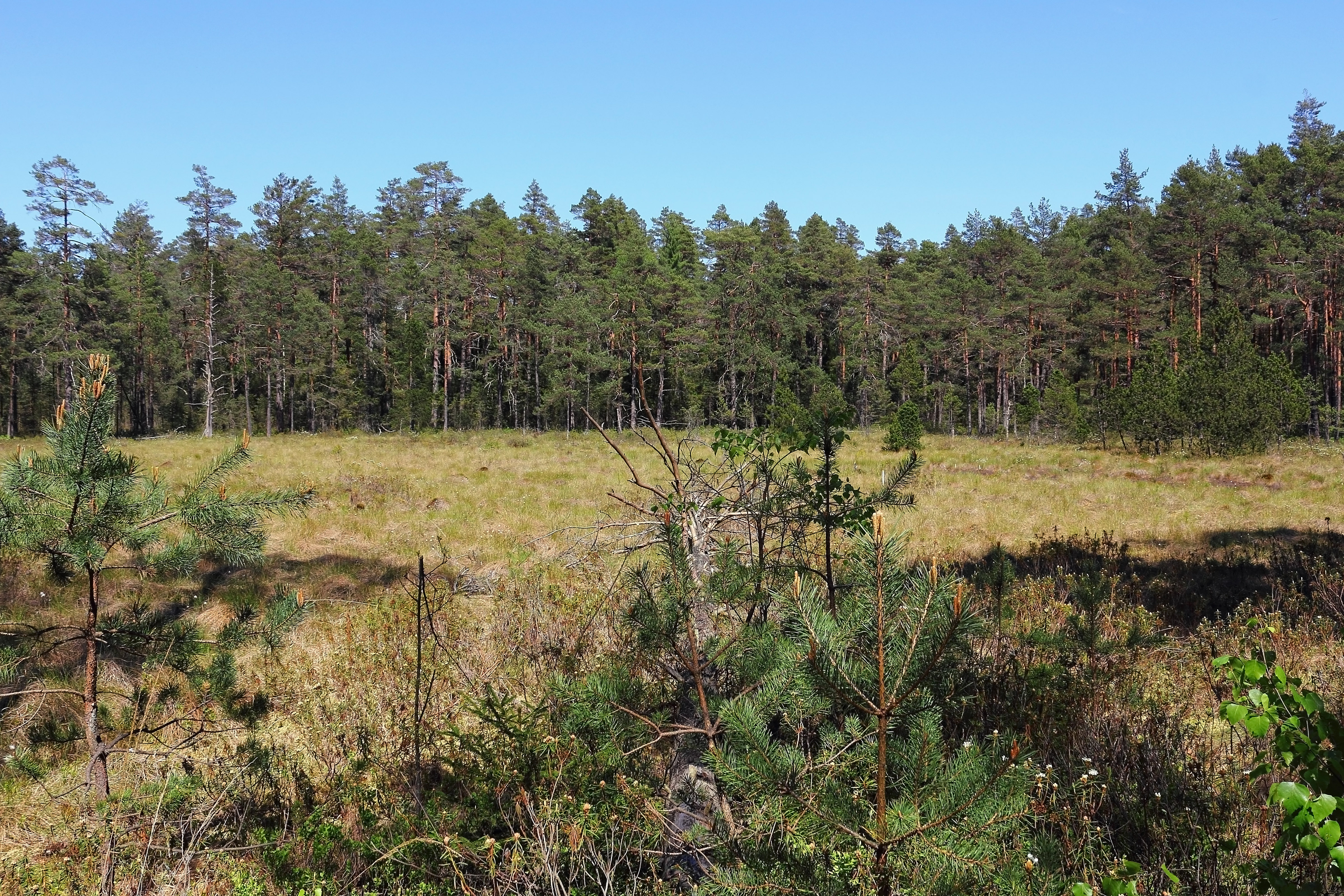 Das Rottalmoos liegt südwestlich von Litschau auf rund 542 Meter Seehöhe und erstreckt sich über eine Fläche von 10,86 Hektar. In dem seit 1999 zum Naturschutzgebiet erklärten Hochmoor wachsen viele gefährdete Pflanzen, etwa der Sumpfporst. This media shows the nature reserve in Lower Austria with the ID 46.